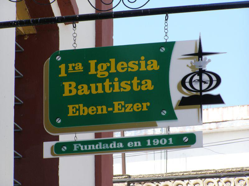 I Iglesia Bautista en Manzanillo, con data de fundación el 22 de Abril del año 1901